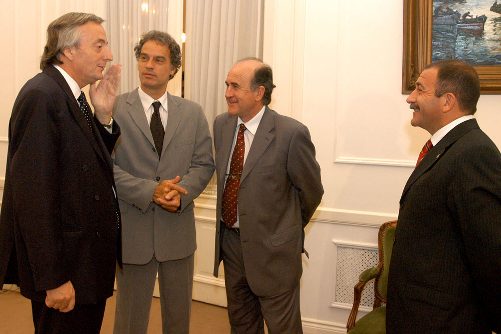 El Presidente argentino Nestor Kirchner junto a Anibal Ibarra (Jefe de Gobierno de la Ciudad de Buenos Aires), Oscar Parrilli (Secretario General de la Presidencia) y Luis Juez (Intendente de la Ciudad de Córdoba).